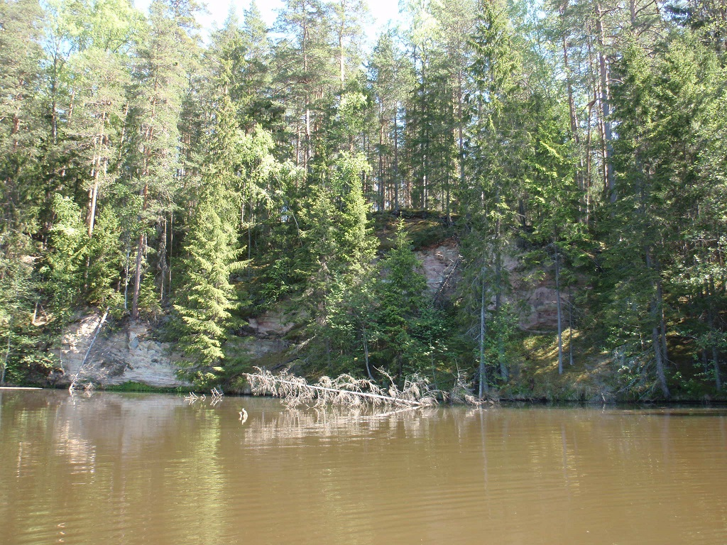 Mõtstare mägi, 2015 mai